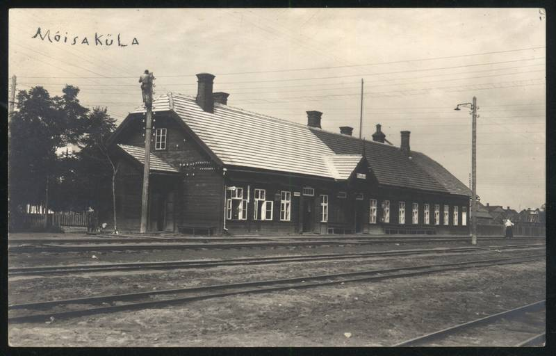 Mõisaküla jaamahoone